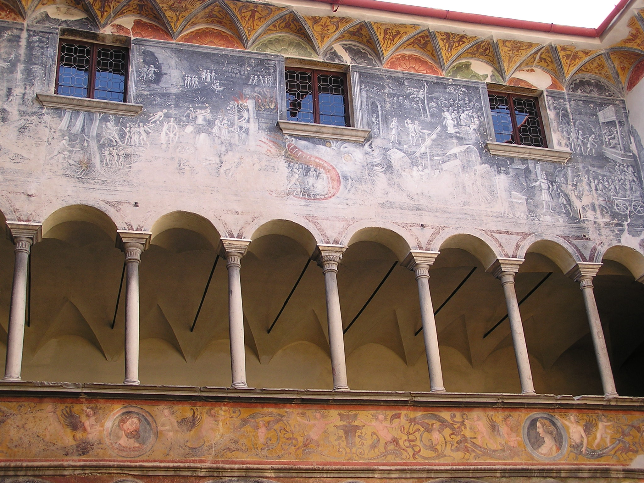 Teglio, Prov. Sondrio, Italien